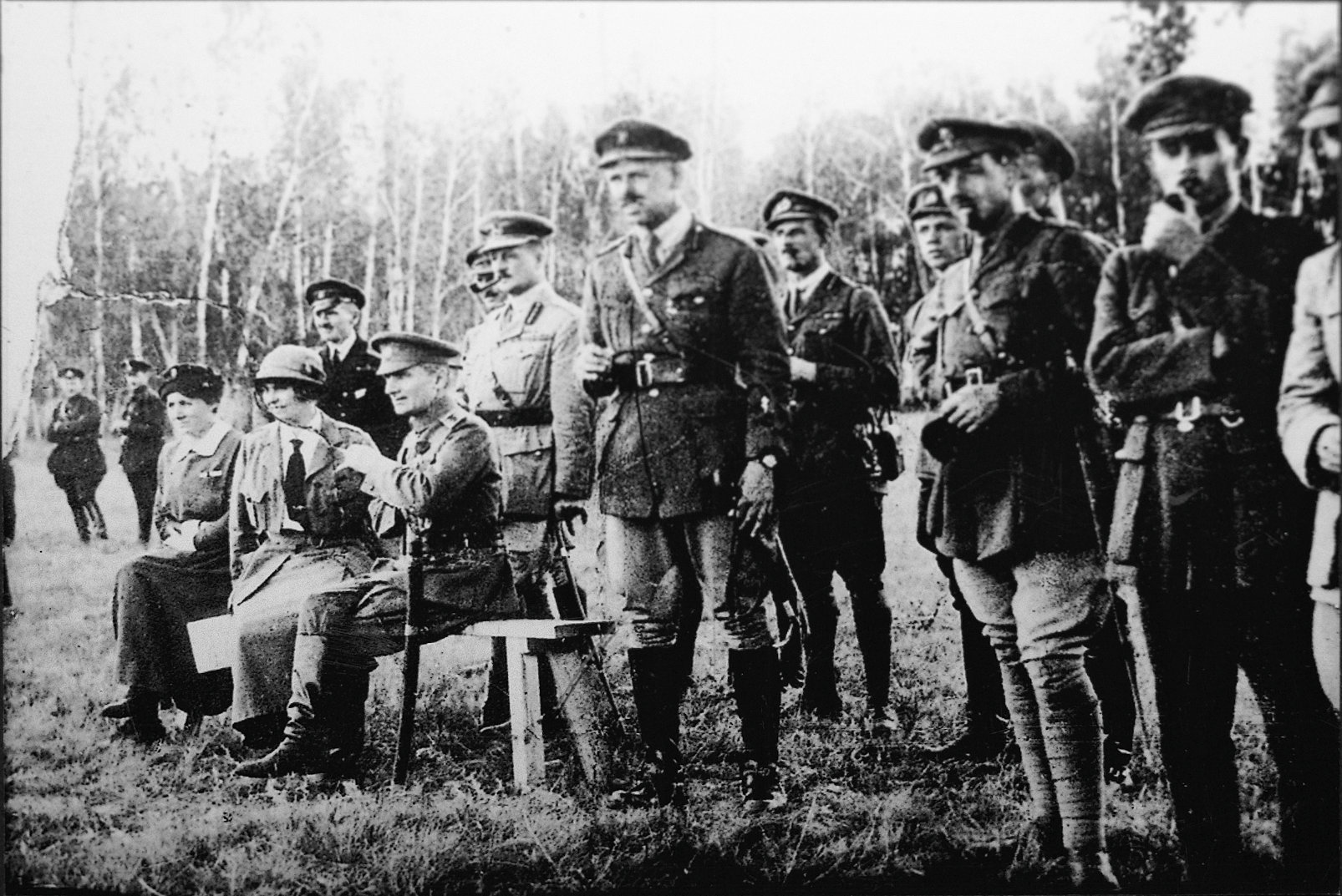 Адмирал А. В. Колчак и А.В. Тимирева (сидят), глава британской миссии генерал А. Нокс и английские офицеры на учениях. Восточный фронт